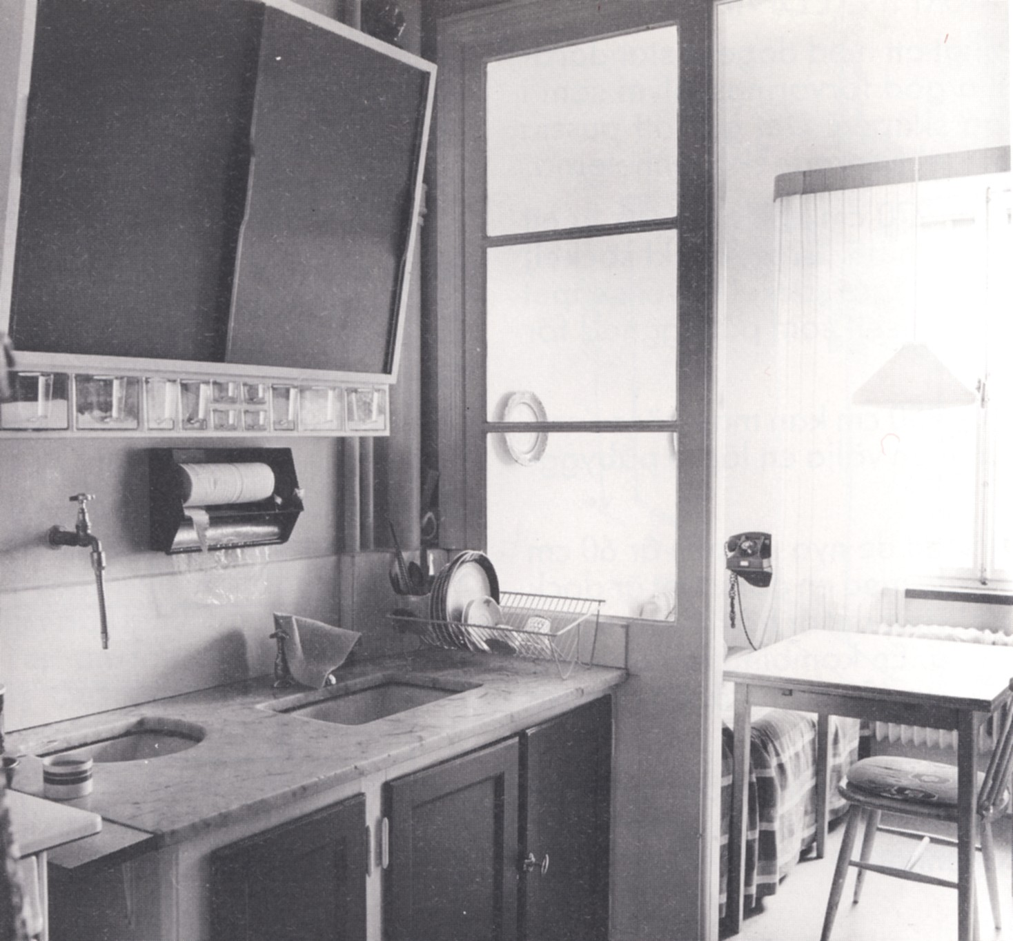 Svenskt kök från 1930-talet